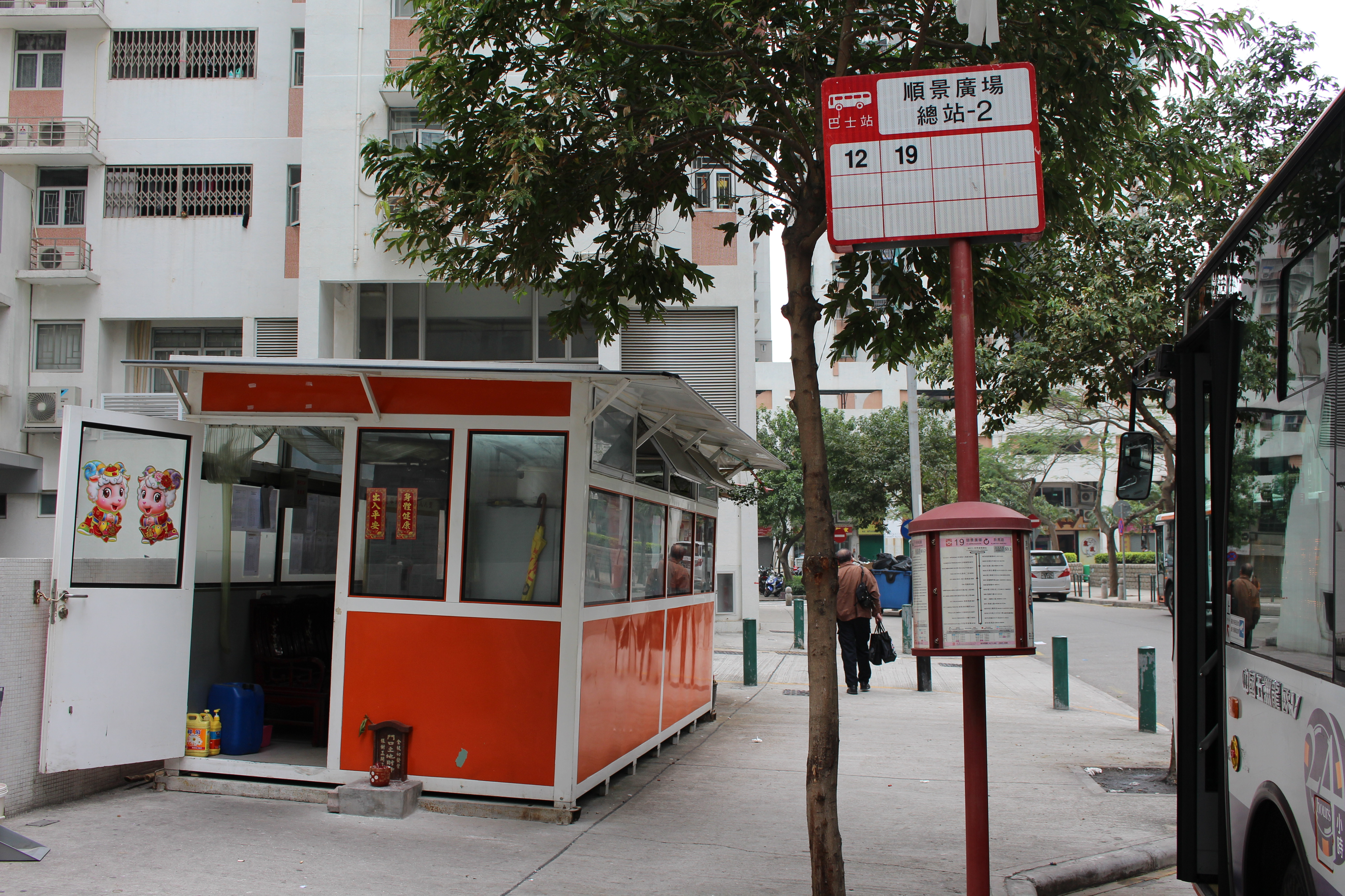 中文（台灣）: 2015年2月的順景廣場總站.